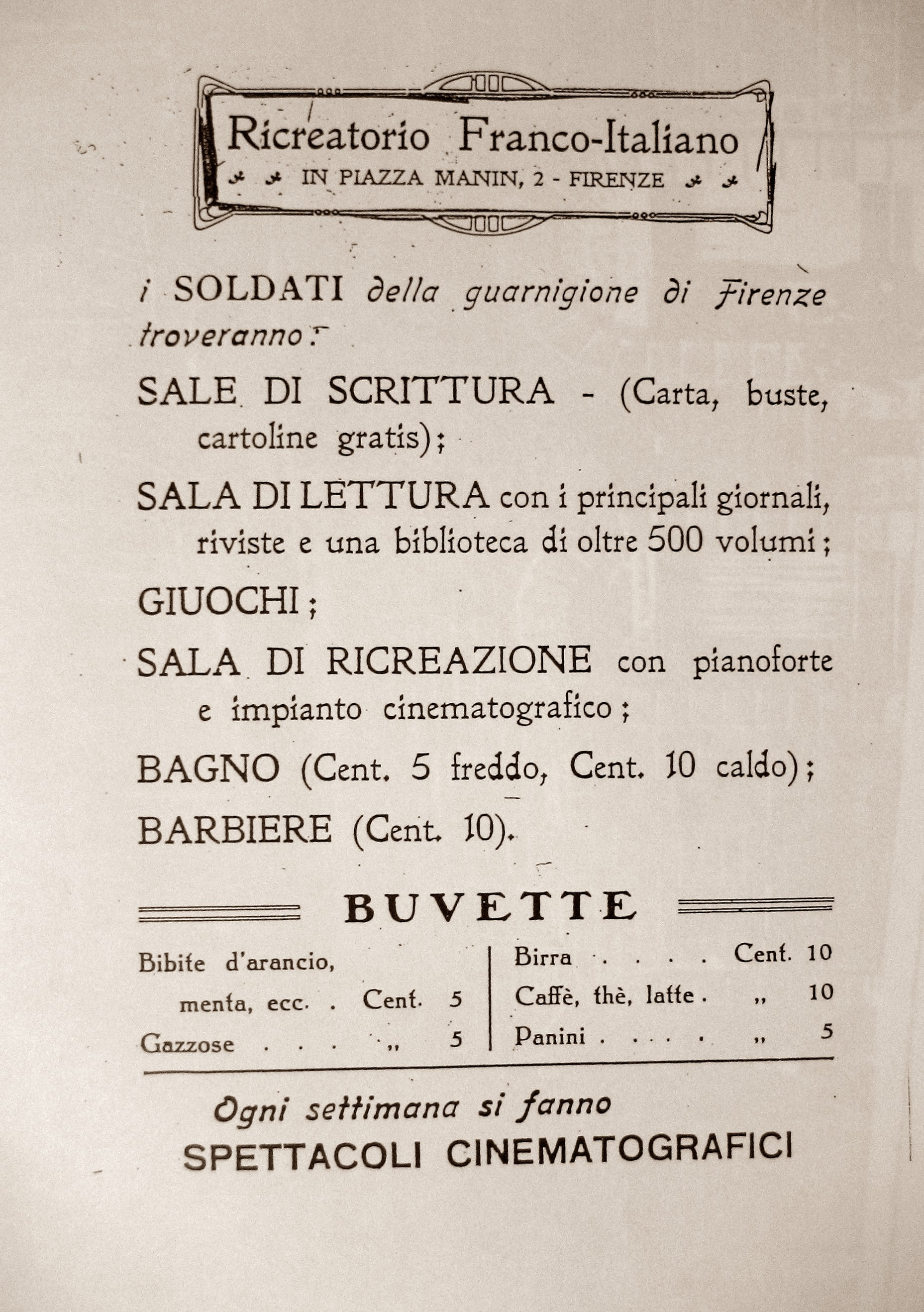 Affiche de la Maison du soldat - Ricreatorio franco-italiano per i soldati - créée par l'Institut français de Florence en 1915 pendant la Première Guerre mondiale